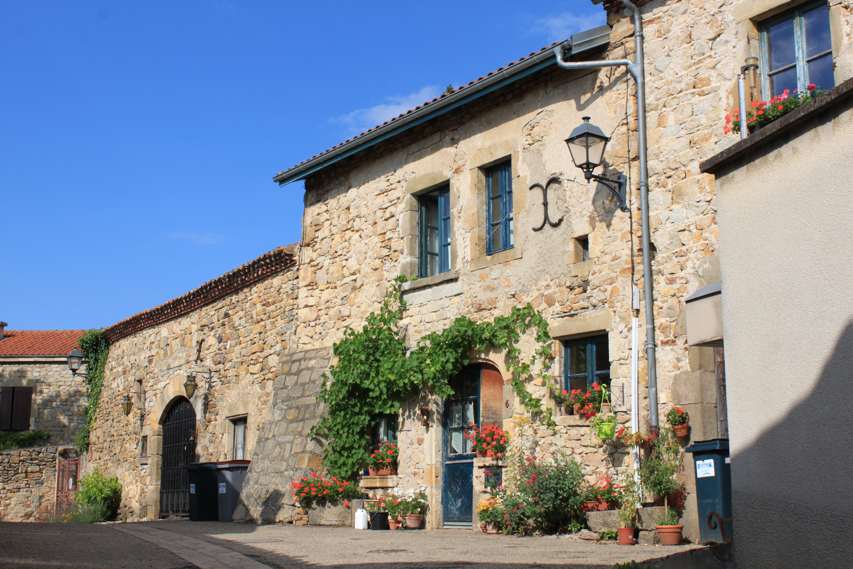 Montpeyroux, Puy-de-Dôme, France